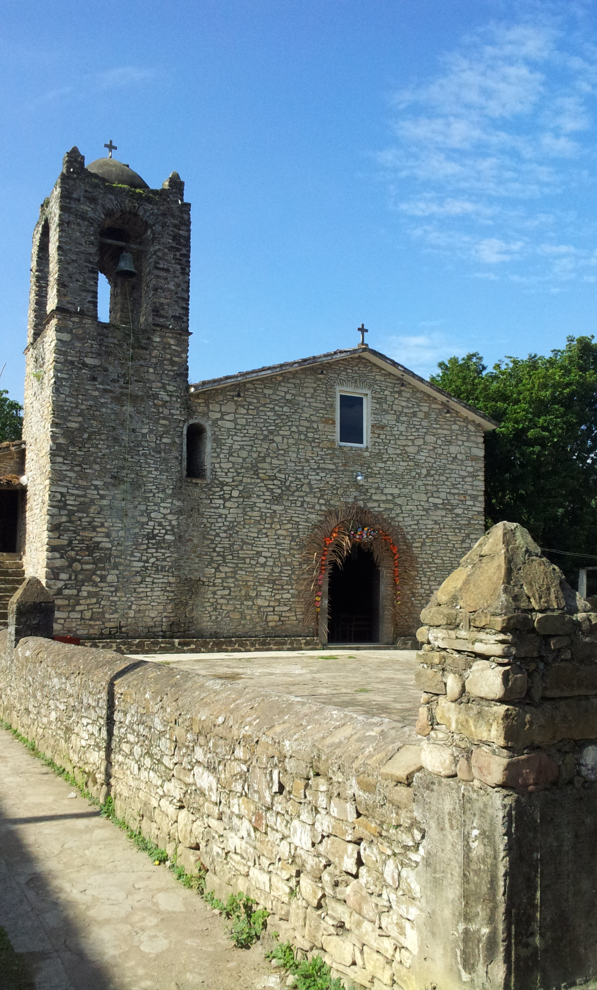 Parroquia de San Agustín 2.1 (Android).